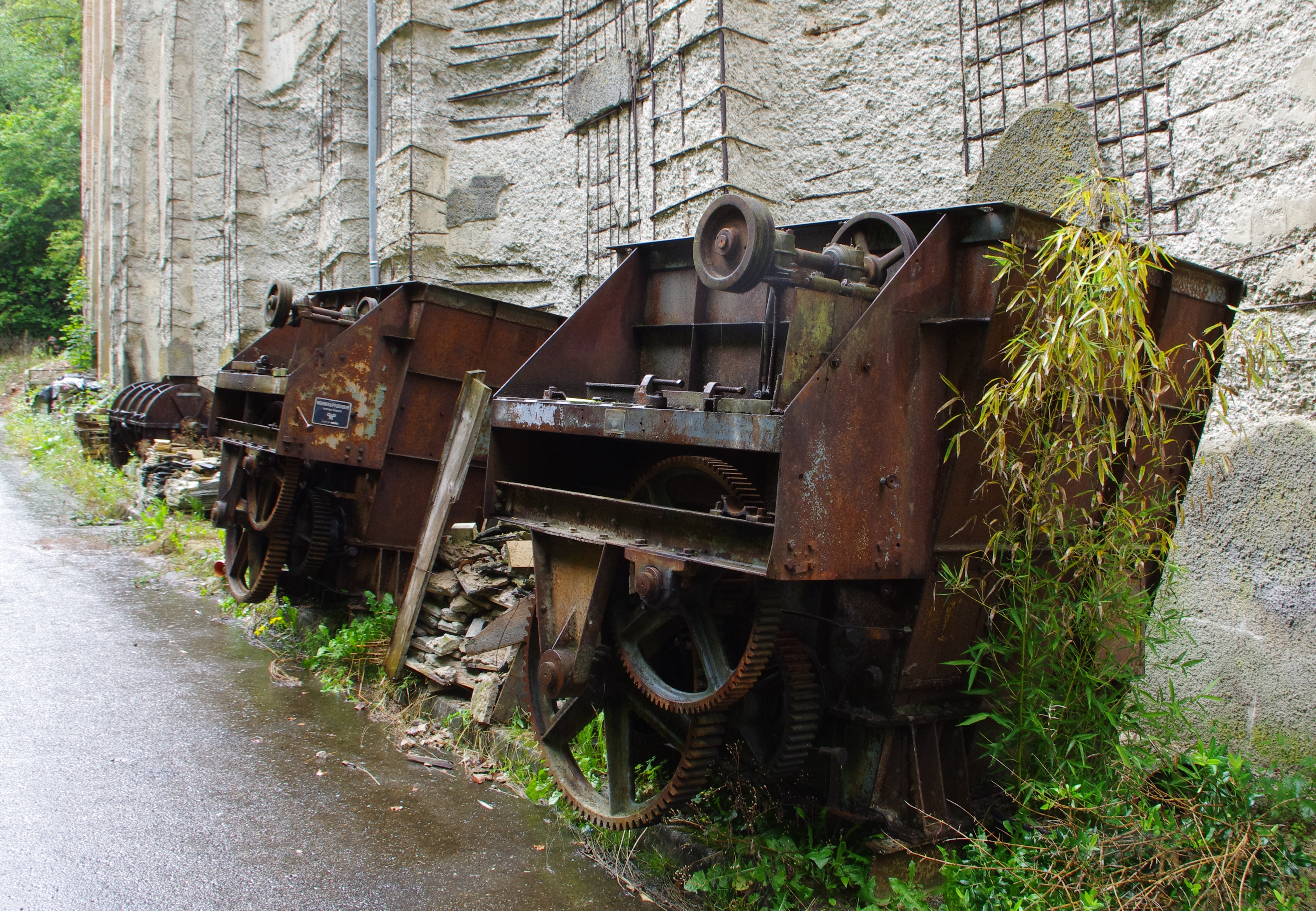 Kraftwerk Rottweil, Neckartal 68, Rottweil, Baden-Württemberg, Deutschland